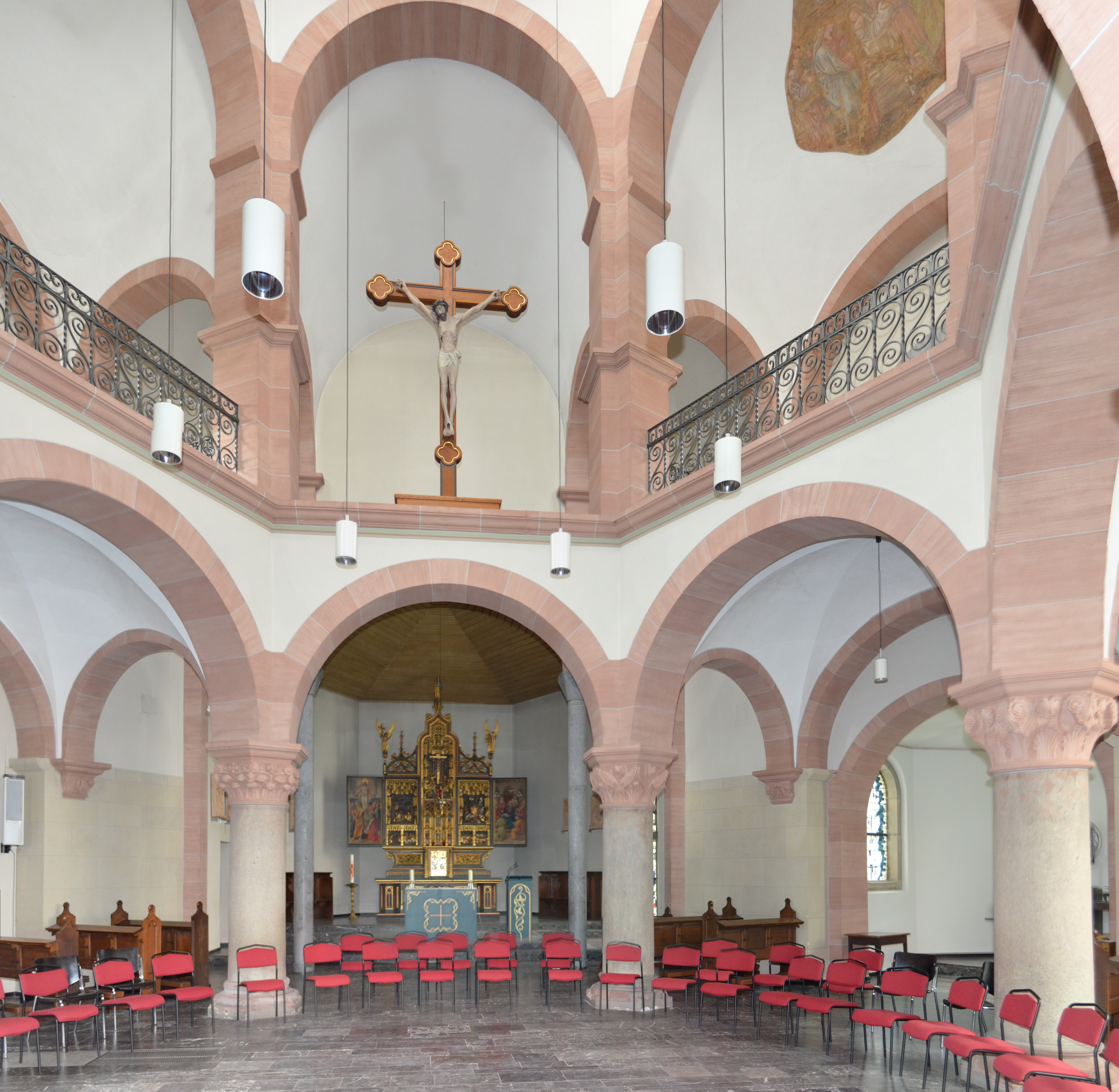 Innenansicht der Marienkapelle in Aachen-Burtscheid This image was created with Hugin